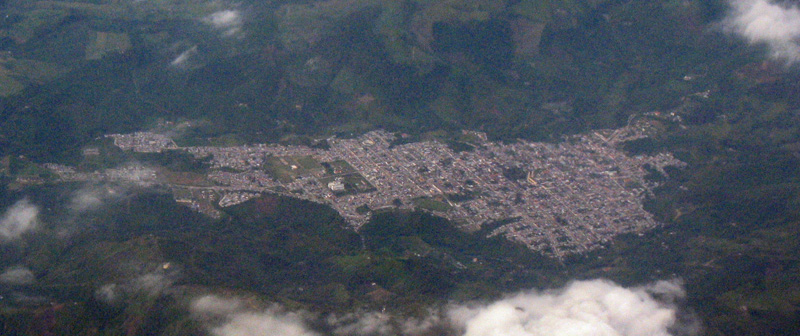 Vista aerea del casco urbano de la ciudad de Libano (Tolima) Colombia